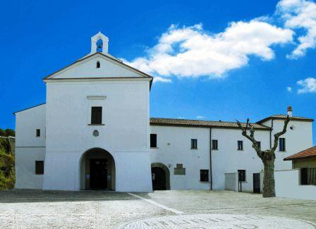 Gesualdo (Italy) - Capuchin monastery